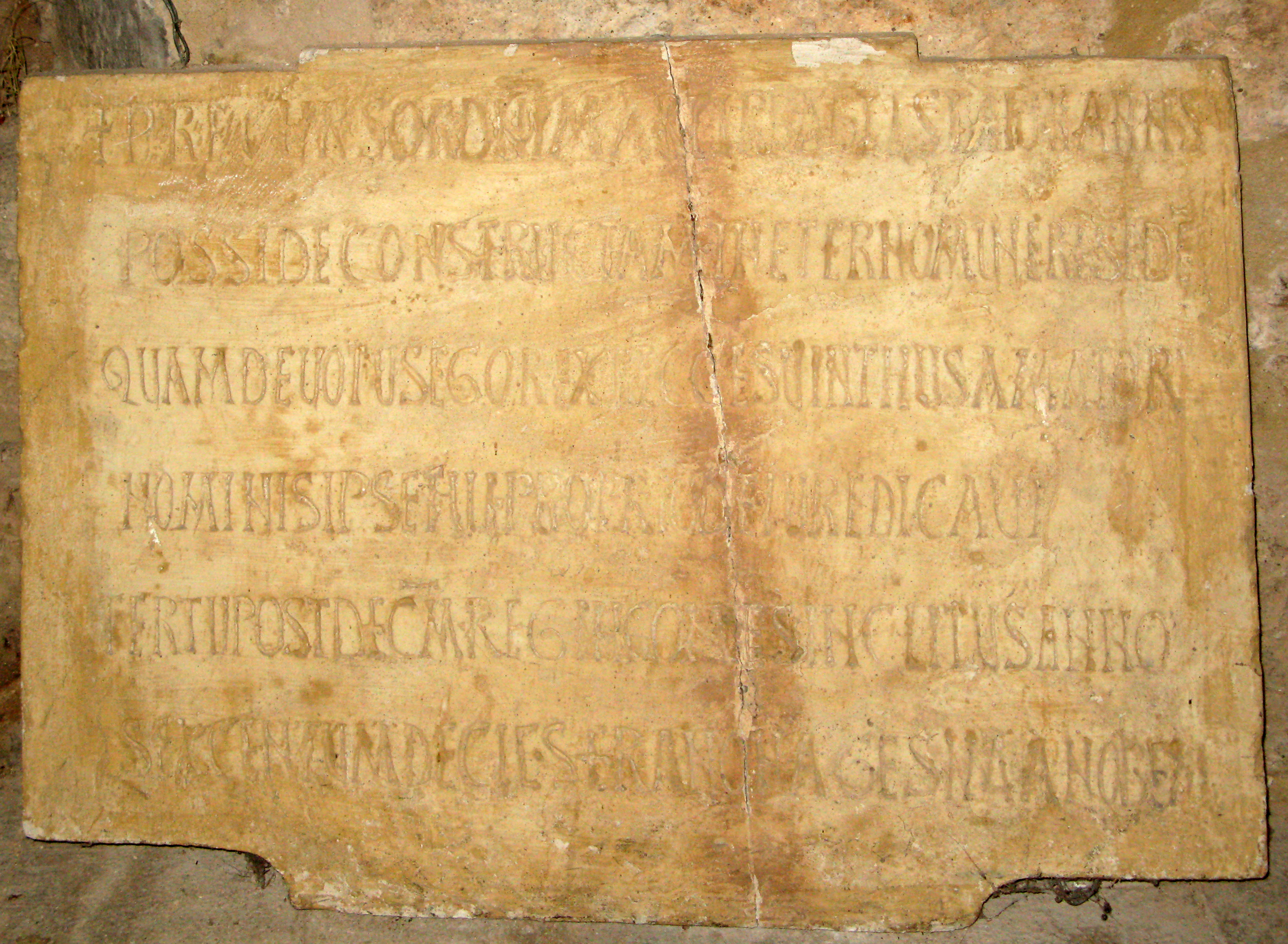 Réplica de la lápida original de consagración de la Iglesia de San Juan de Baños en la localidad de Baños de Cerrato, en el municipio de Venta de Baños, provincia de Palencia (Castilla y León, España). Este templo fué mandado construir por el rey Recesvinto y su ceremonia solemne de consagración se cree que fue el día 3 de enero de 661.